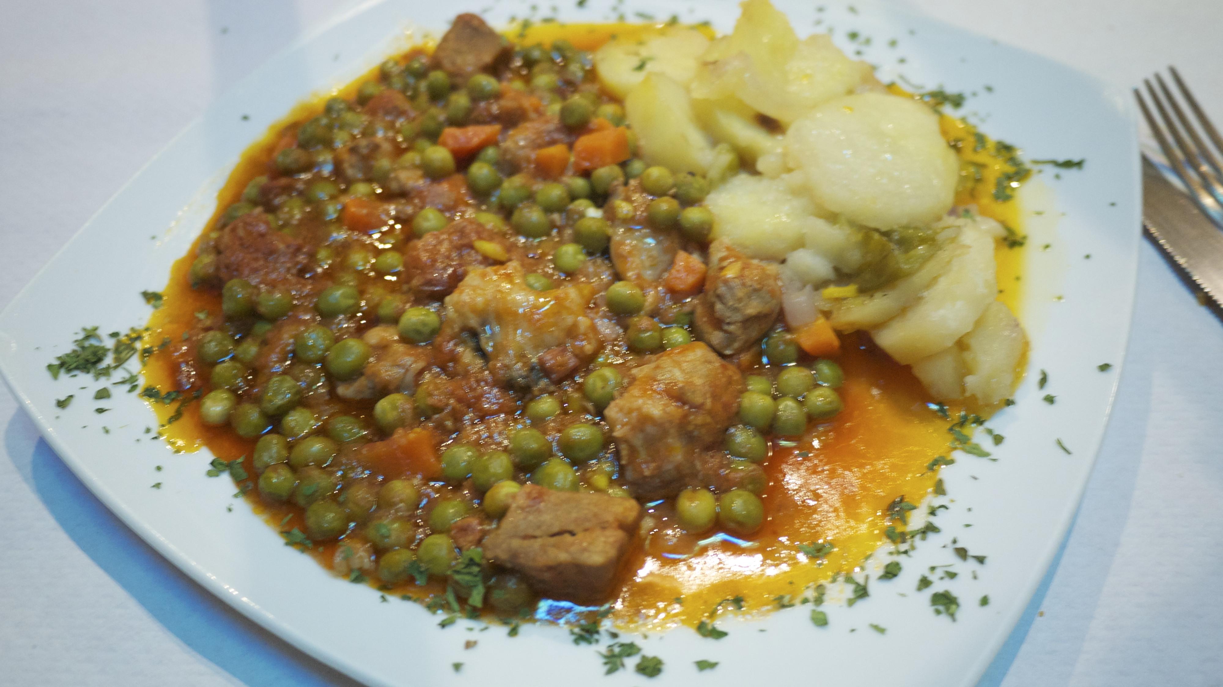 Carcamusas，Toledo傳統菜，辣醬燉牛肉